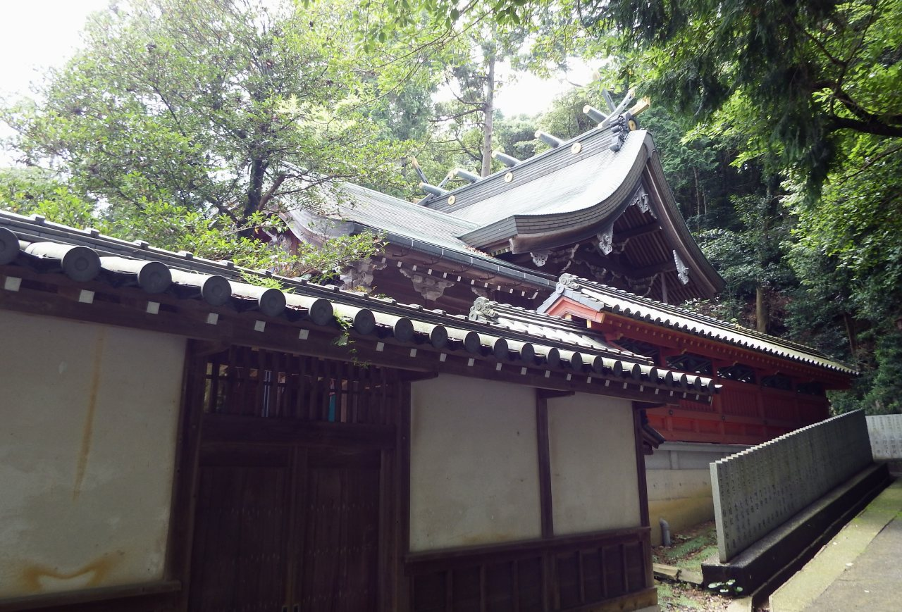 伊予稲荷神社の本殿